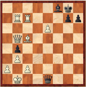 Ejemplo A